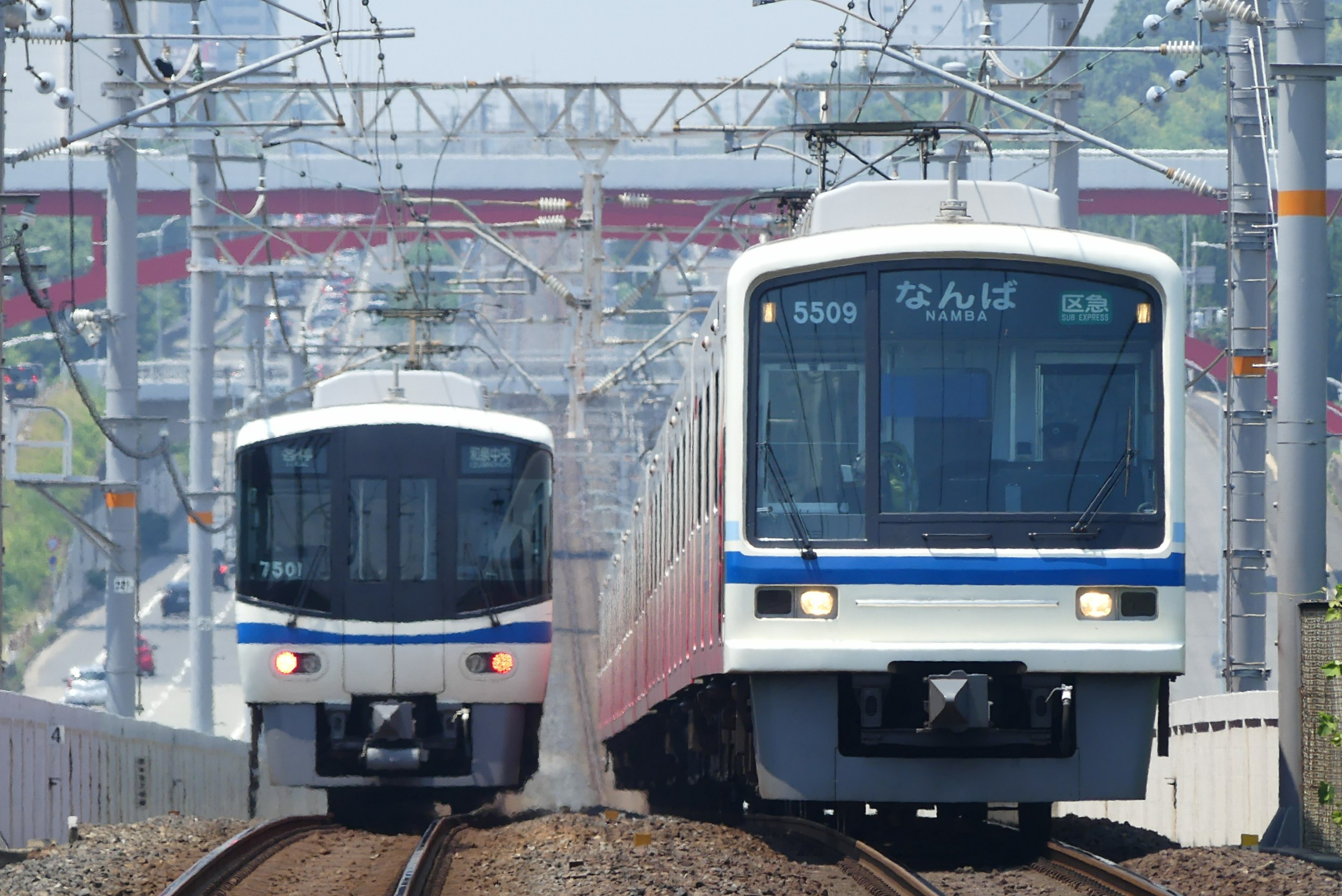 泉北高速鉄道線